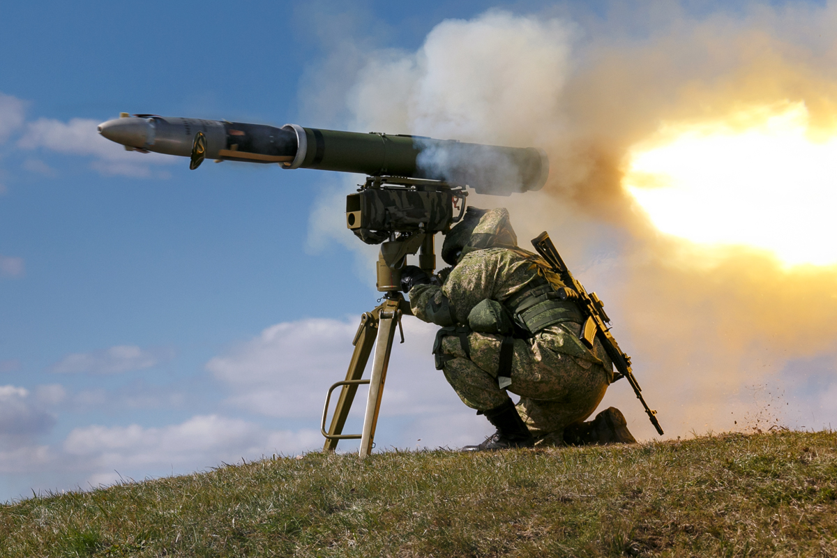 Контрольная проверка курсантов Учебного центра боевого применения ракетных войск и артиллерии Сухопутных войск Западного военного округа (Московская обл.)